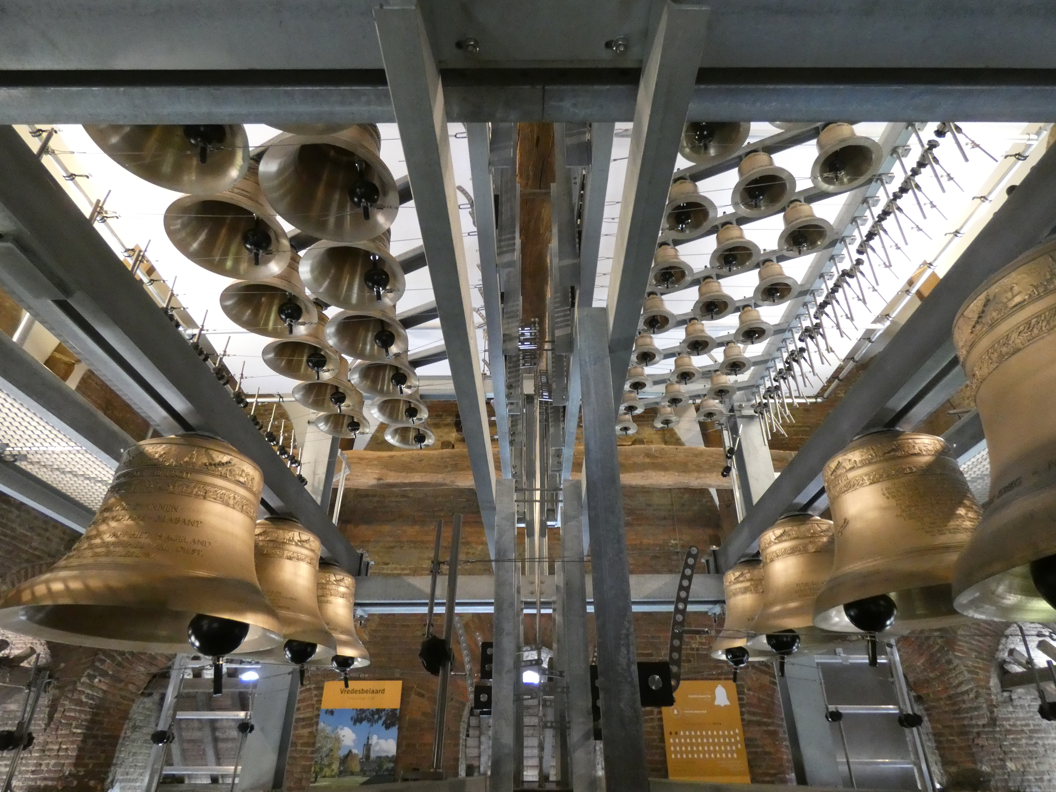 Nouvelles cloches du carillon de la paix d'Aarschot. Eijsbouts 2018.